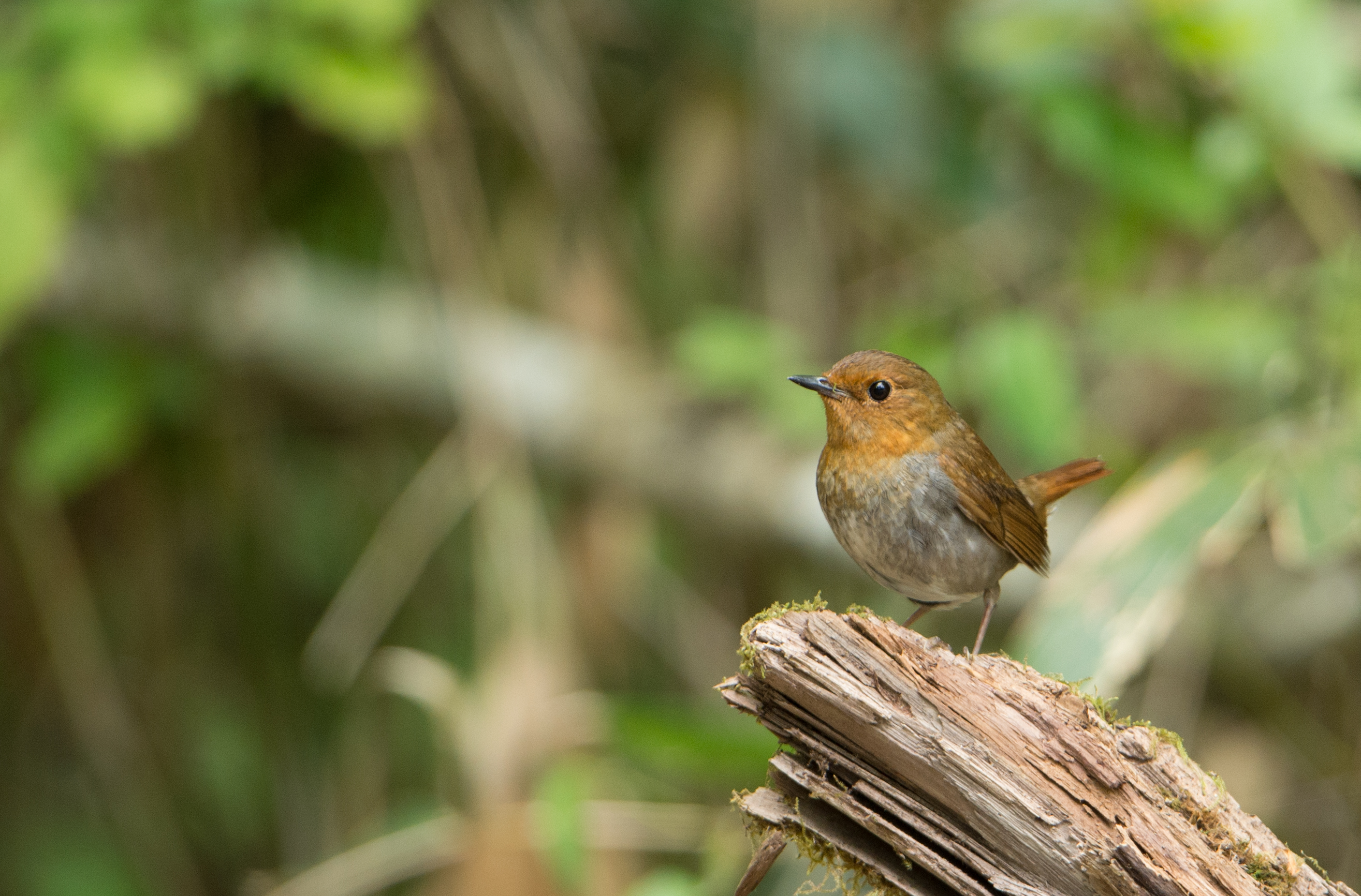 Komadori Larvivora akahige, Yamanashi Prefecture, Japan